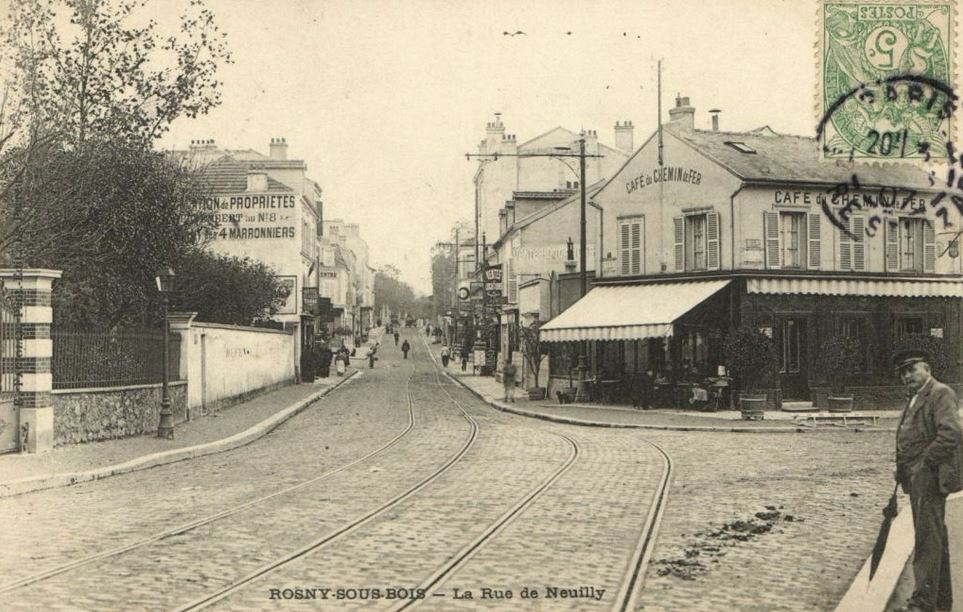 Rosny-sous-Bois. Rue de Neuilly (aujourd'hui rue du Général-Leclerc).